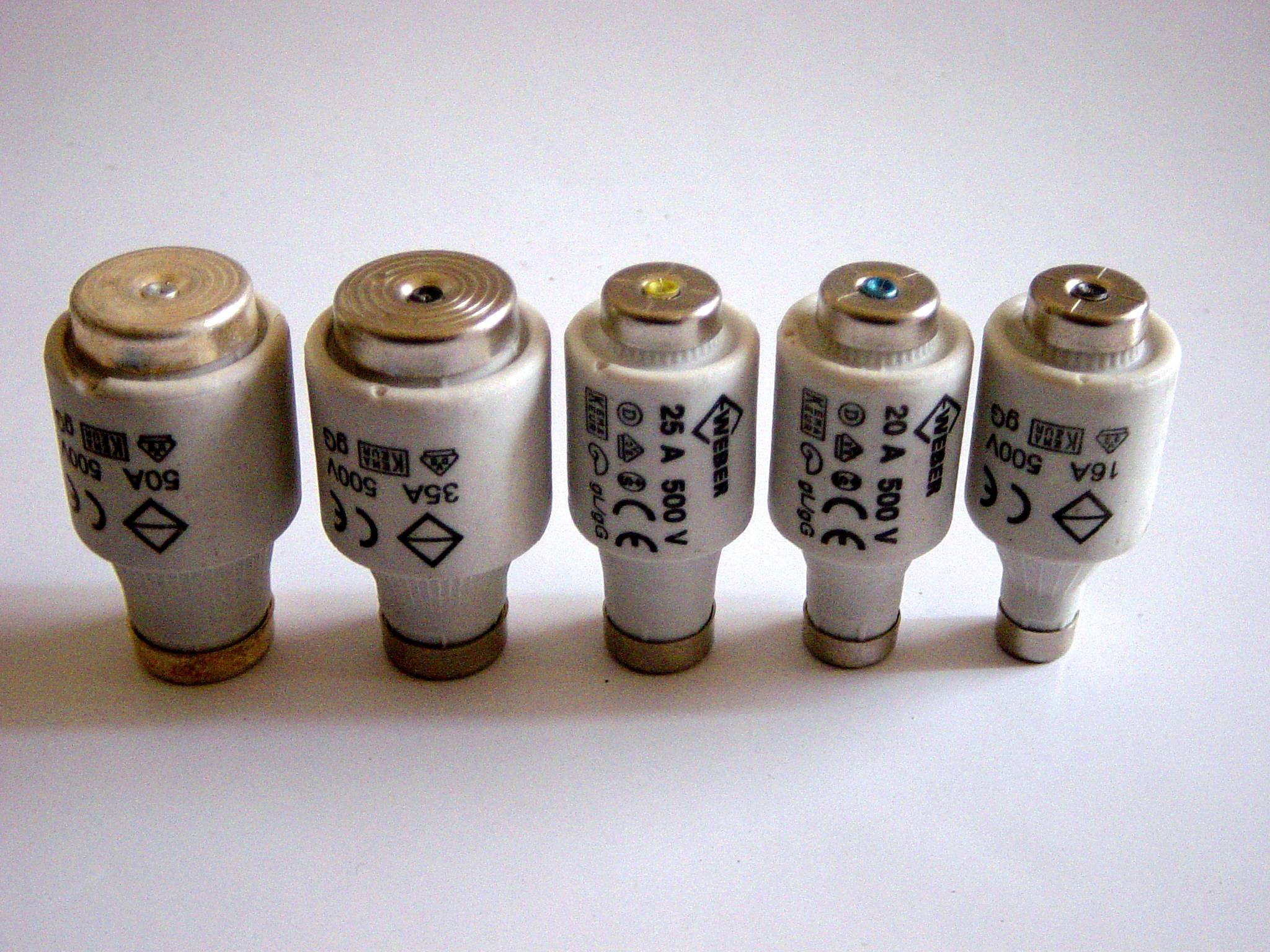 DIAZED fuses, 50A, 35A, 25A, 20A, 16A